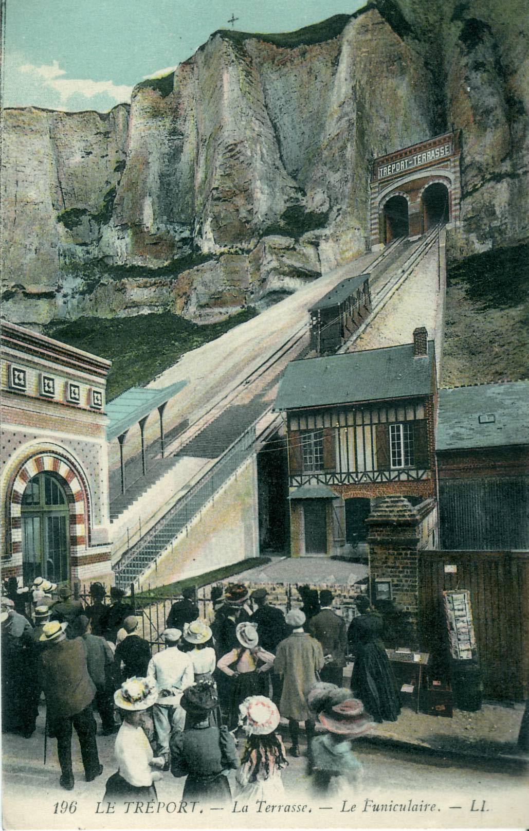 Carte postale ancienne éditée par LL, N°196 LE TREPORT : La Terrasse - Le Funiculaire